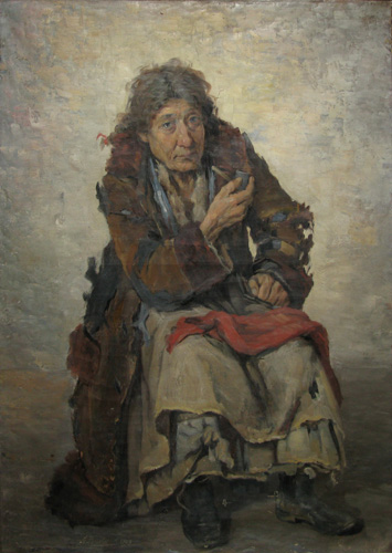 Gheorghe Popovici - Ţigancă, ulei pe pânză, semnat, datat 1893 stânga jos; lucrarea a participat la expoziţia retrospectivă "Gh. Popovici", organizată de Muzeul de Artă din Iaşi, 1969 -1970, cat.9 şi e reprodusă la pag. 48 a catalogului expoziţiei. Este reprodusă în "Maeştrii picturii româneşti - Gh. Popovici", cat 26; 81x60 cm.